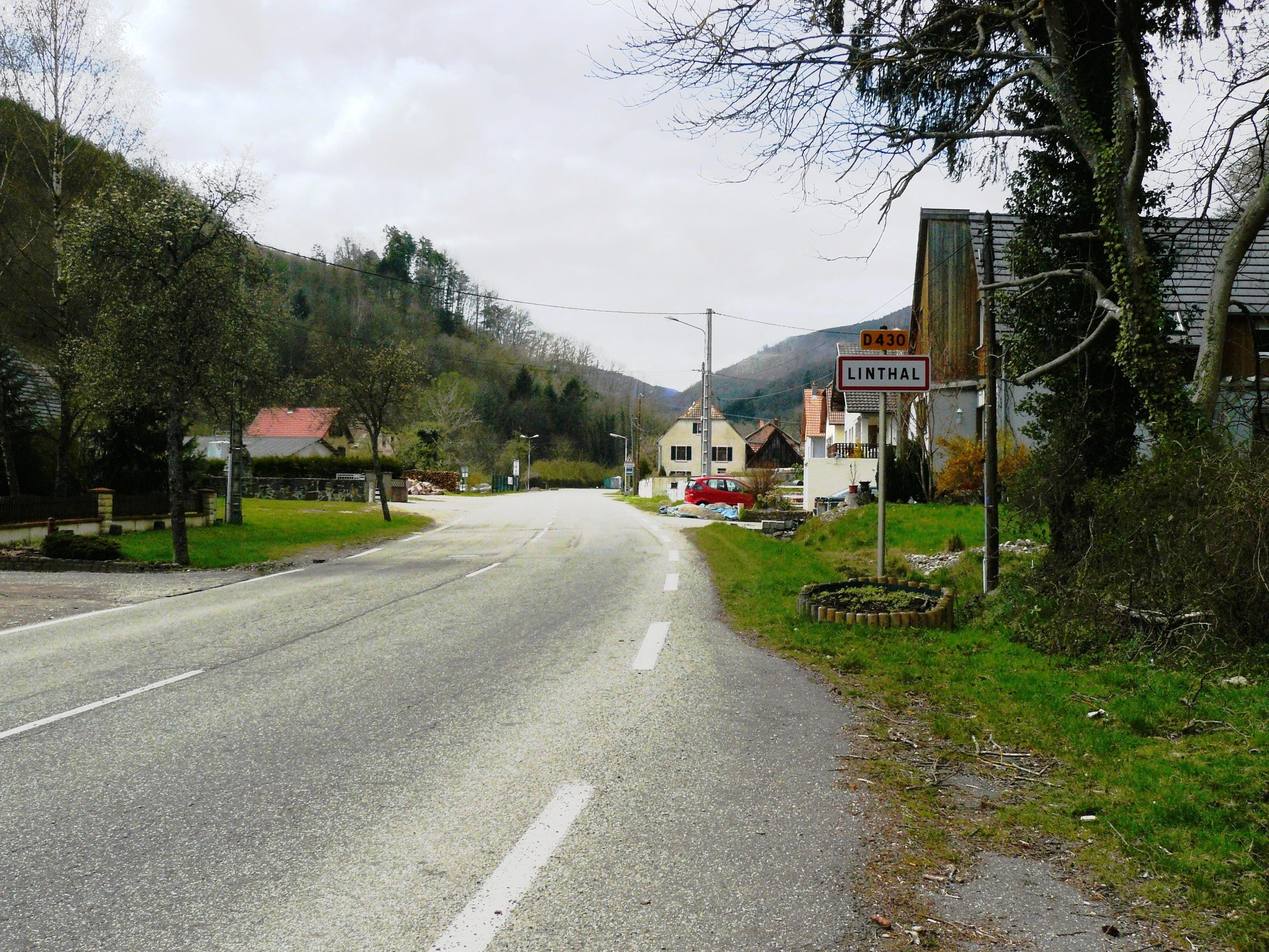 L'entrée du village de Linthal